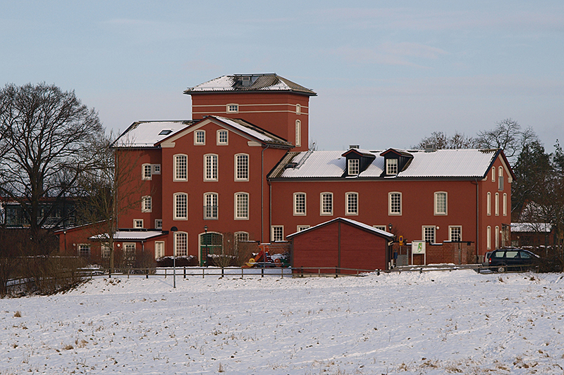 Gamla bränneriet i Södra Sandby, sett från Möllan.